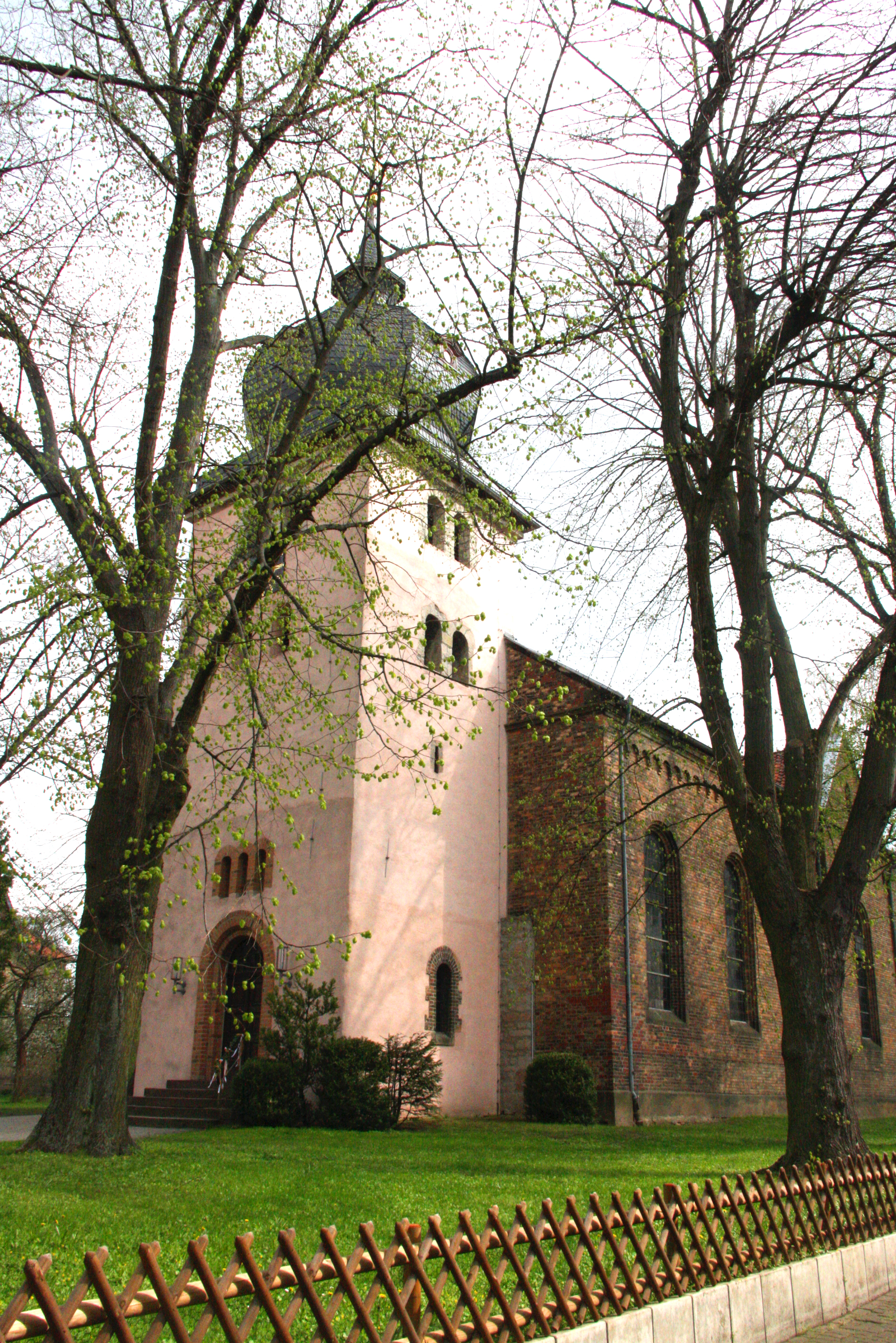 evangelische Kirche in Braunschweig-Timmerlah